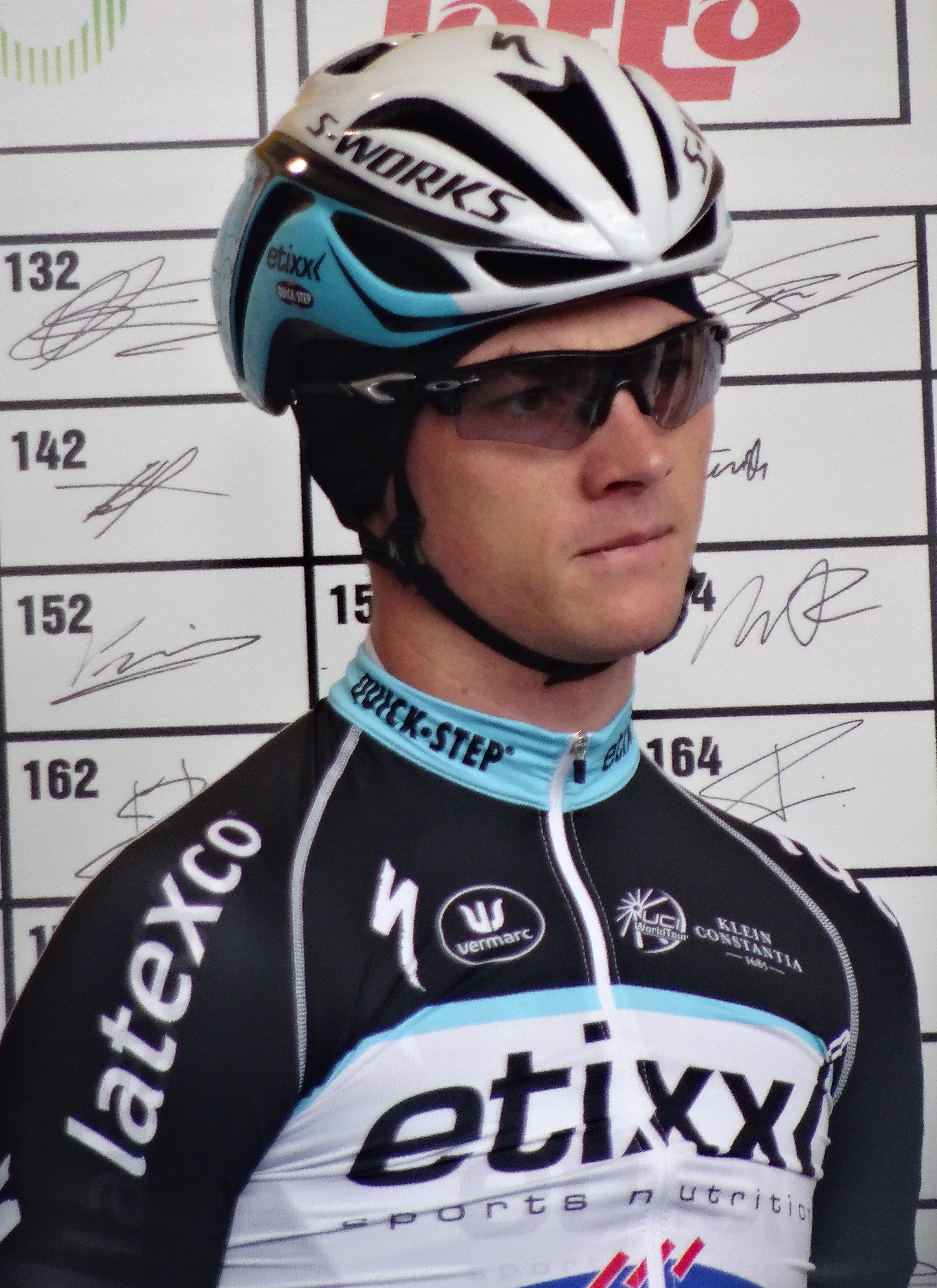 Reportage réalisé le dimanche 1er mars à l'occasion du départ et de l'arrivée de Kuurne-Bruxelles-Kuurne 2015 à Kuurne, Belgique.